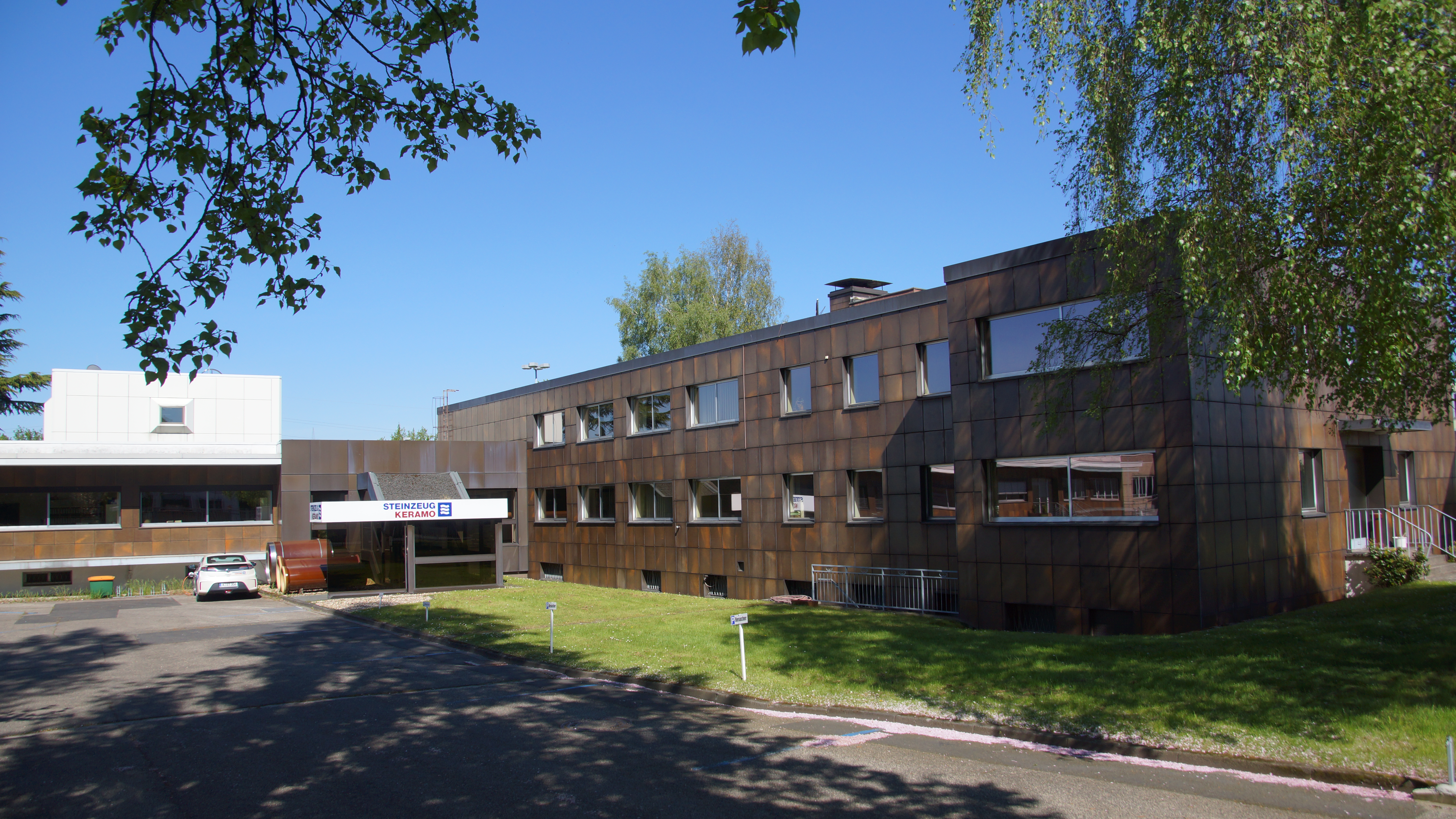 Verwaltungsgebäude Steinzeug-Keramo GmbH in Frechen Alfred-Nobel-Str. 17